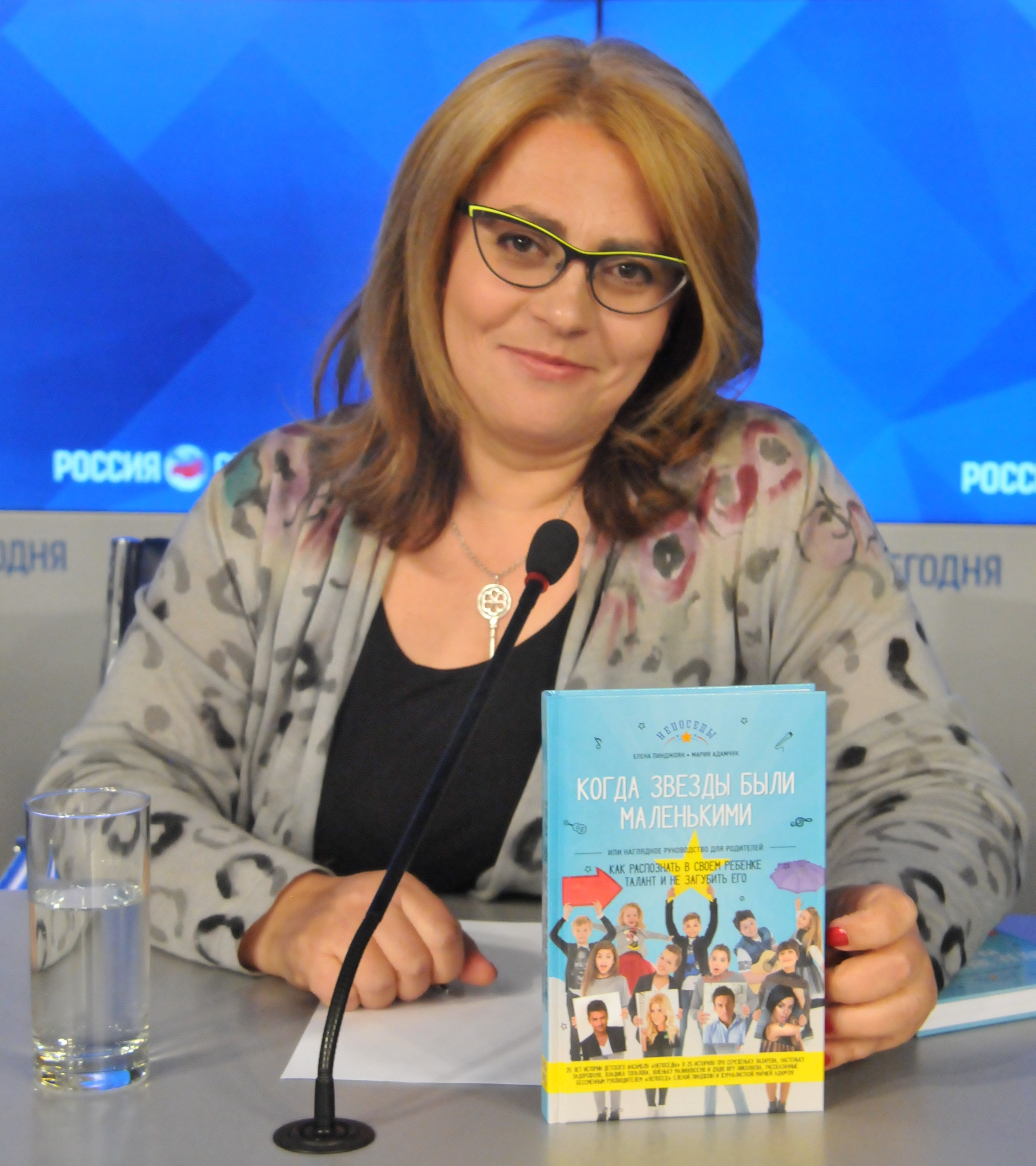 Елена Пинджоян со своей книгой